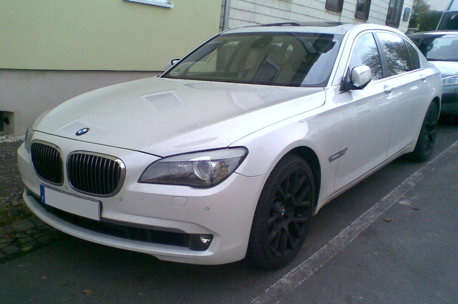 BMW 760Li